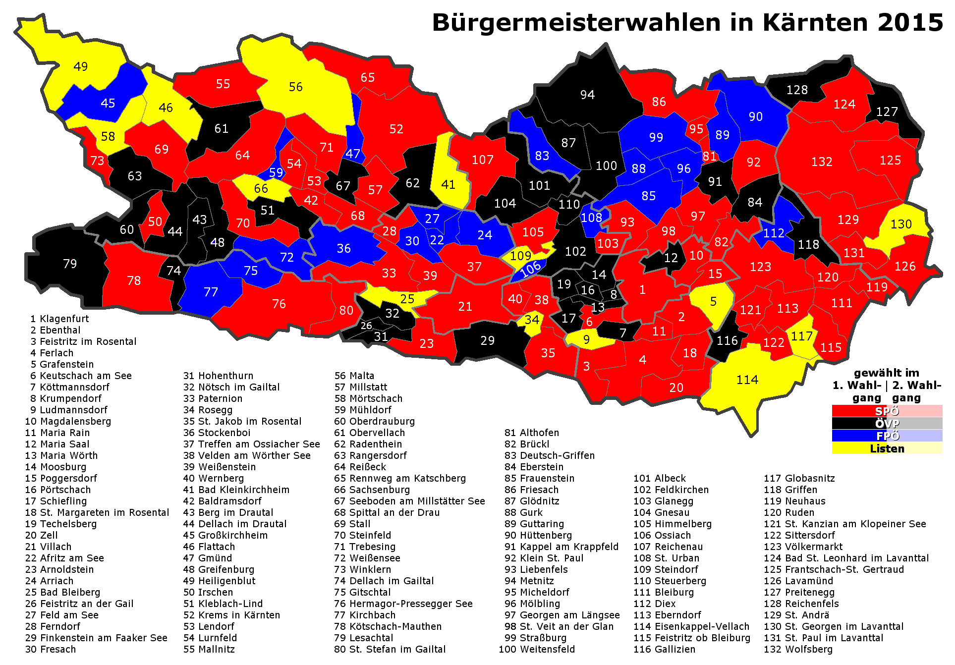 Bürgermeisterwahlen in Kärnten 2015 – Ergebnisse nach Wahlgängen (update: inklusive der 1. Stichwahl vom 15. März 2015 und der 2. Stichwahl vom 29. März 2015)